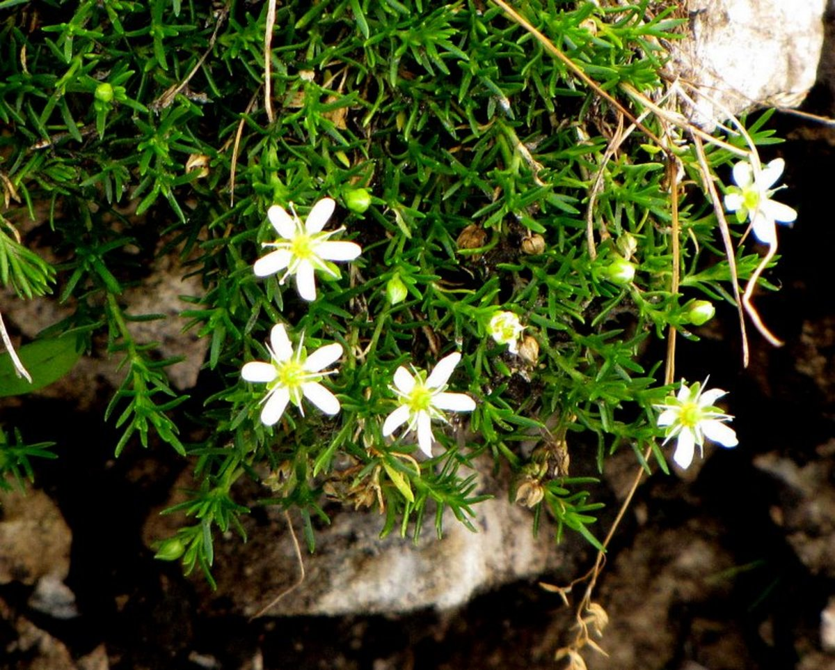 Resasta popkoresa na Storžiču.